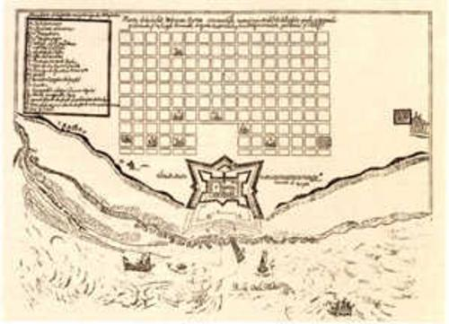 Plano del Fuerte de Buenos Aires ubicado donde hoy se encuentra la Casa de Gobierno, plano realizado por Joseph Bermúdez año 1708.